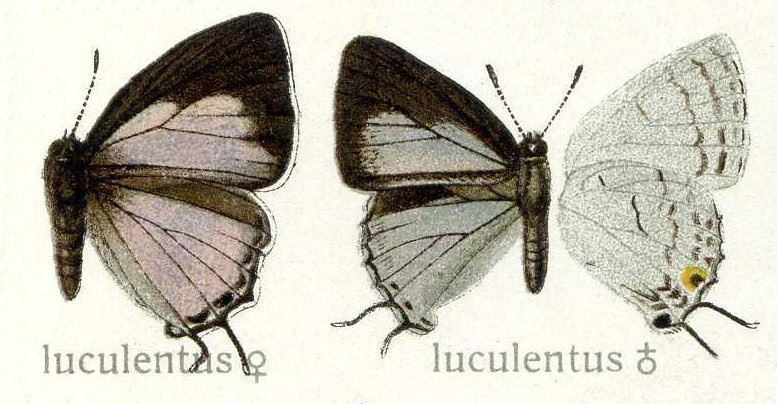 Iolaus luculentus, Lycaenidae